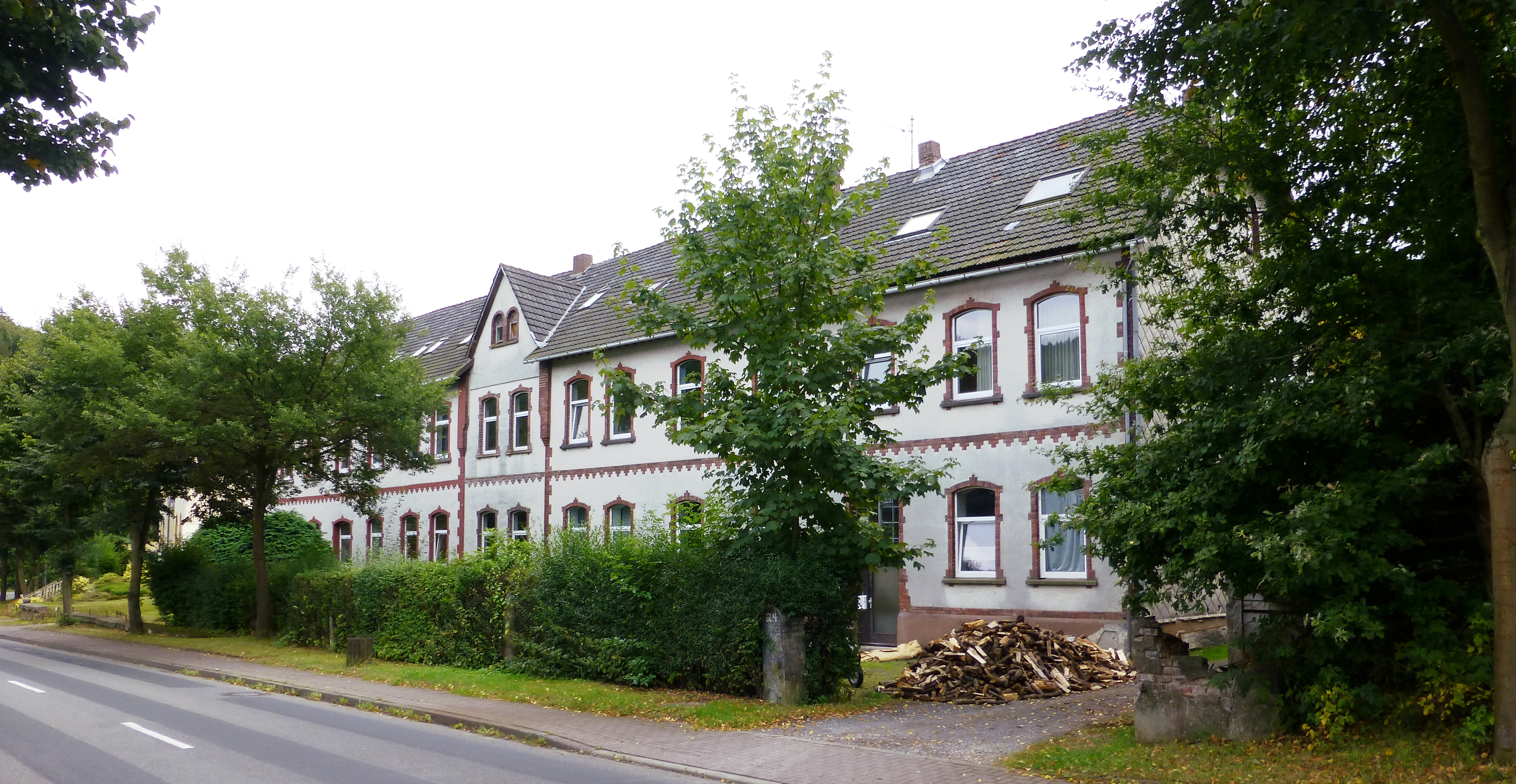 Ehemaliges Wohngebäude für ledige Arbeiter des Kalischachtes Volpriehausen, Stadt Uslar, Niedersachsen. Erbaut Anfang 20. Jahrhundert